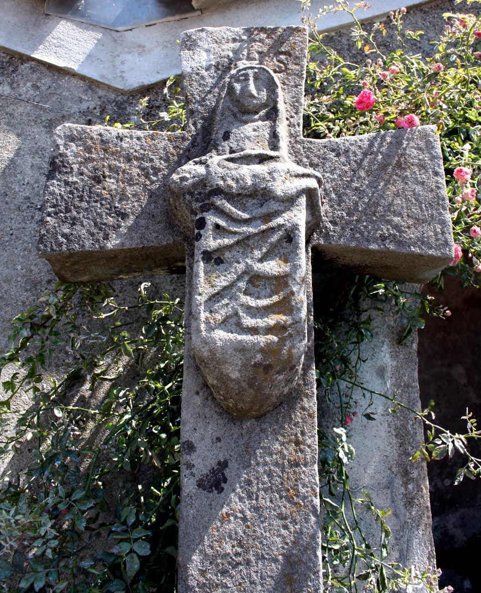 Crois sculptée datée de 1640 et inscrite aux Monuments historiques